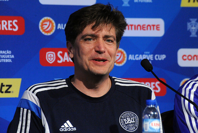 a_74_4718